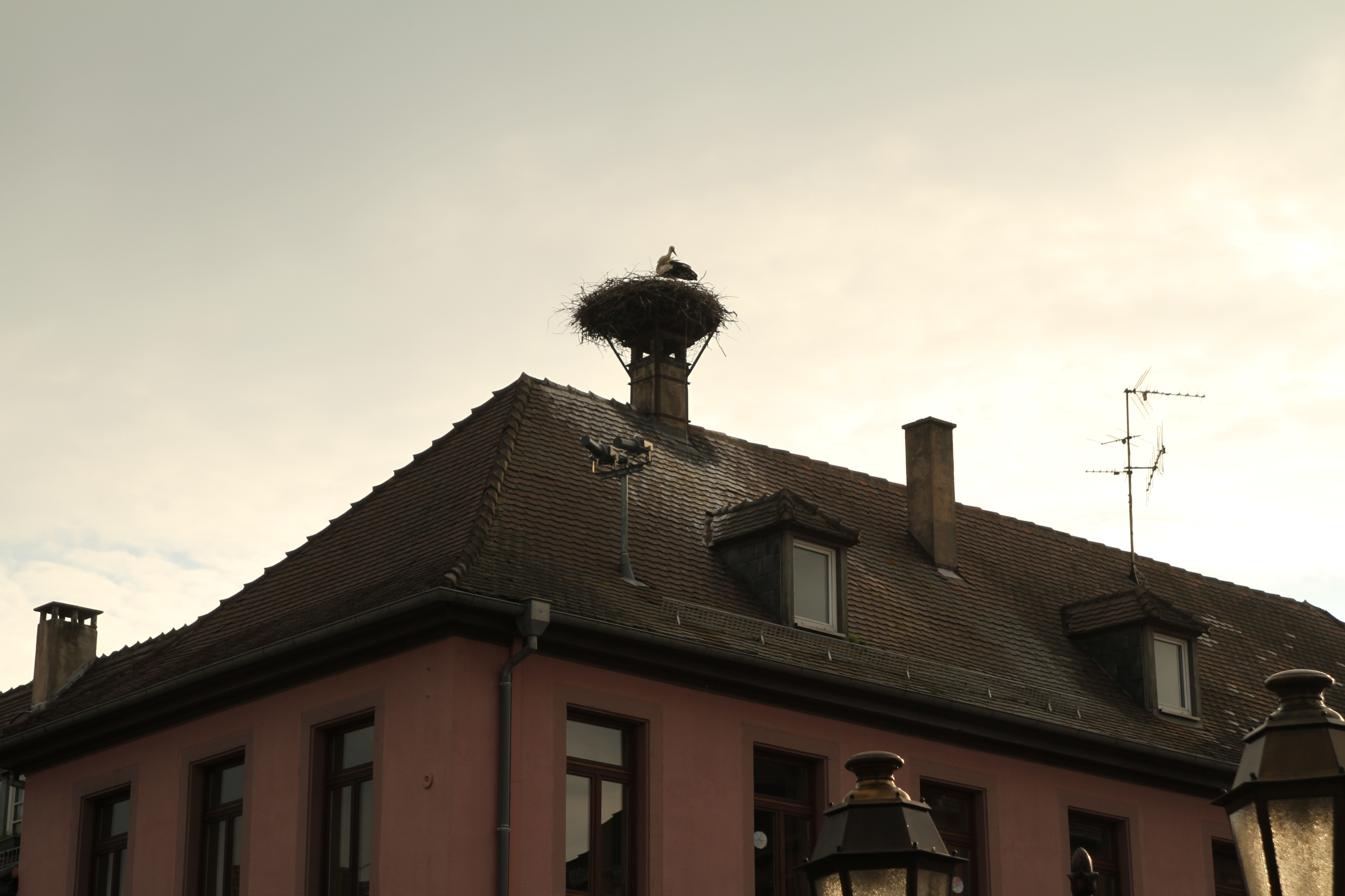 Ein Storchennest auf einem Haus gegenüber der Kirche in Seltz.